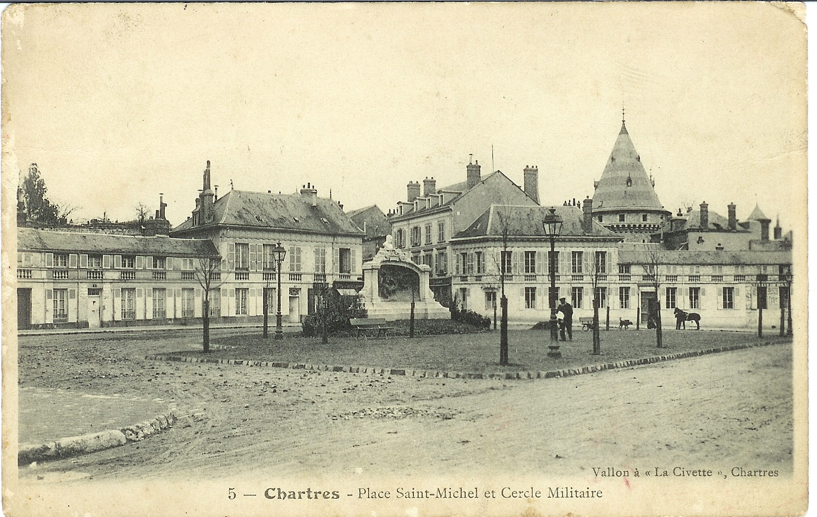 Place Saint-Michel et Cercle Militaire, avant 1907, Chartres Eure-et-Loir (France).